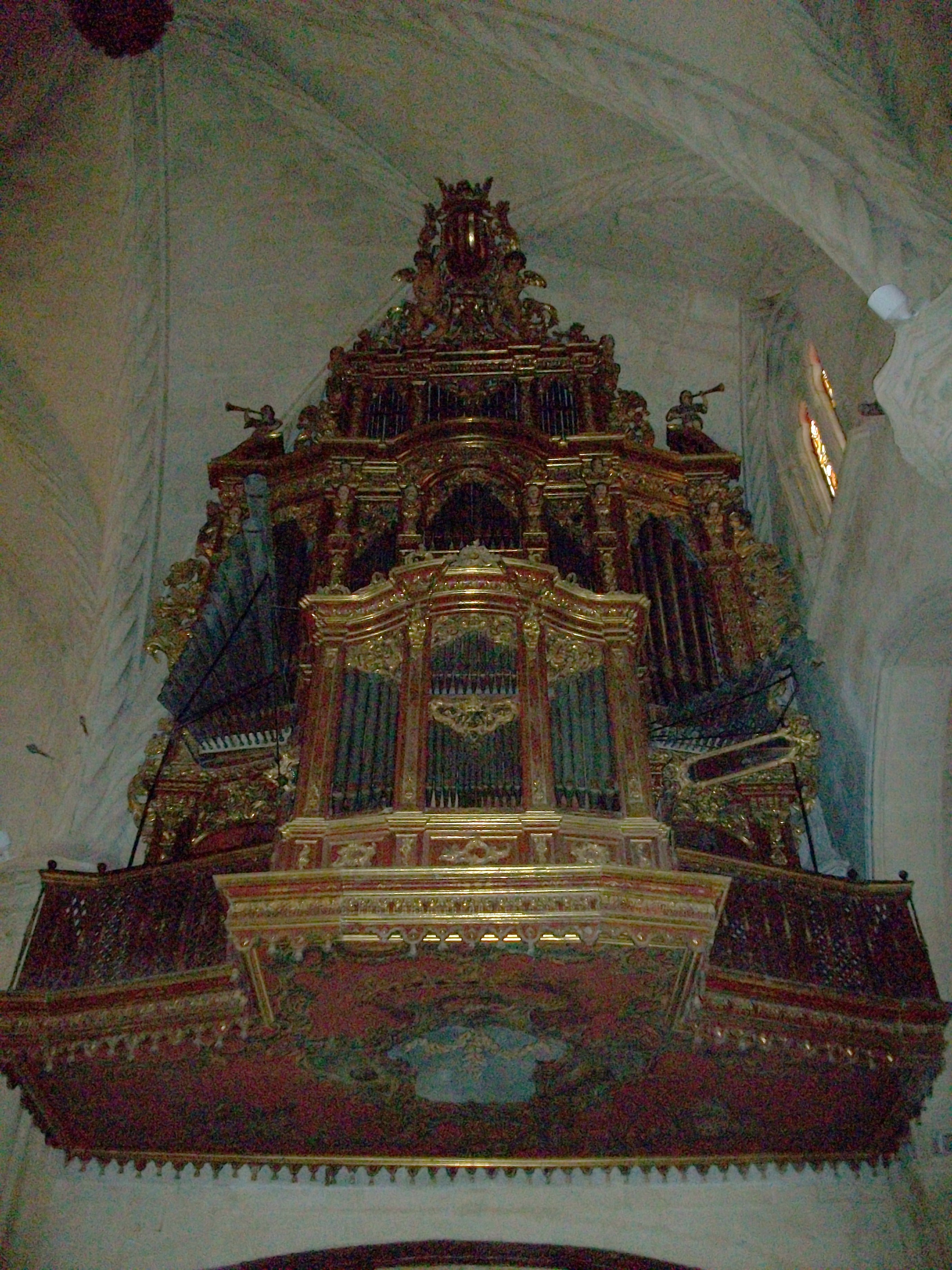 Orgue de la catedral d'Oriola.